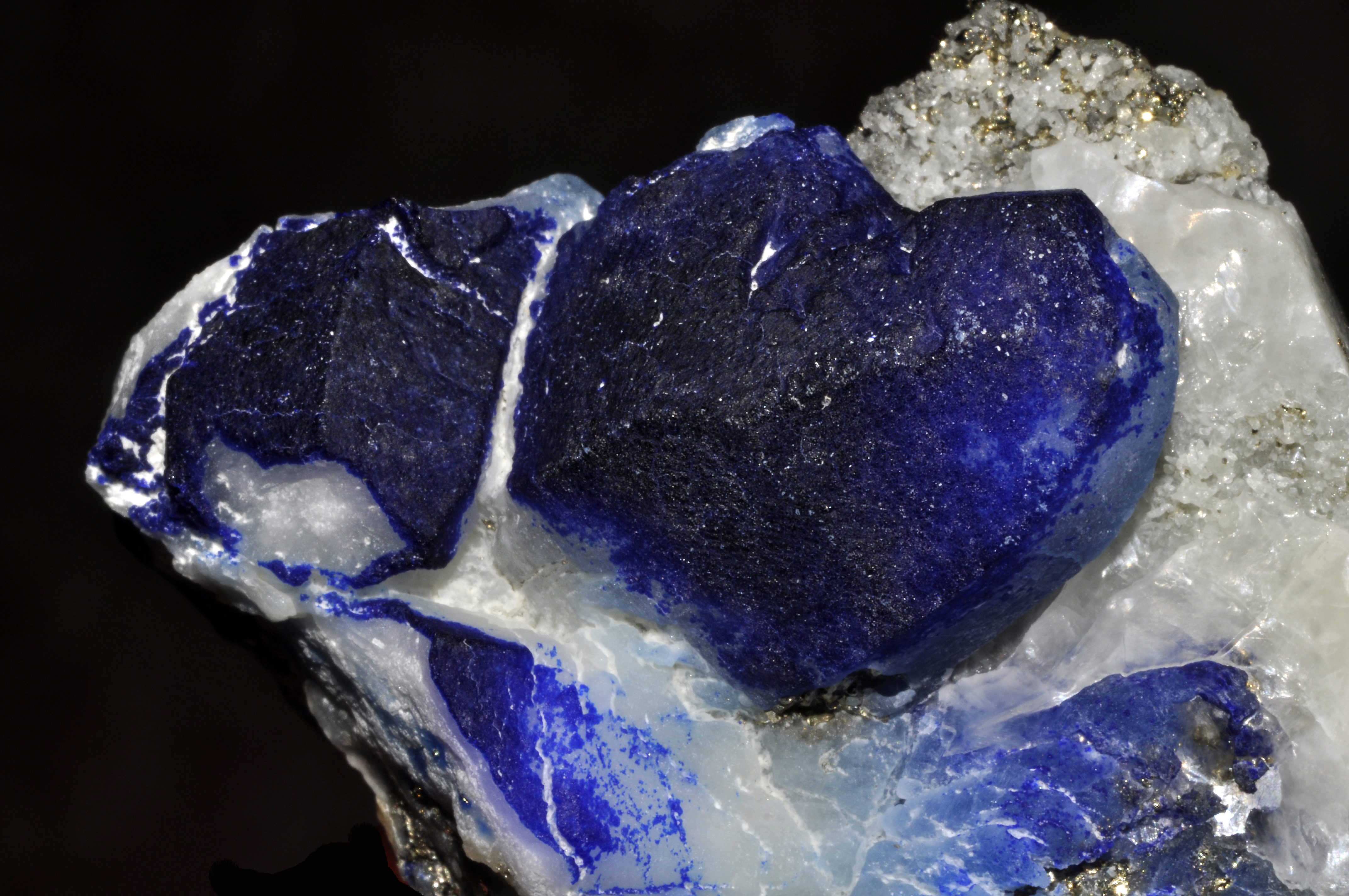 afghanite, pyrite, pyrite : Sar-e-Sang (Sar Sang ; Sary Sang), Koksha Valley (Kokscha Valley ; Kokcha Valley), Khash & Kuran Wa Munjan Districts, Badakhshan Province (Badakshan Province ; Badahsan Province), Afghanistan